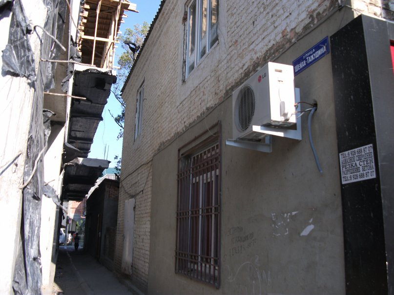 участок улицы Шейха Тажудина в Хасавюрте, Россия